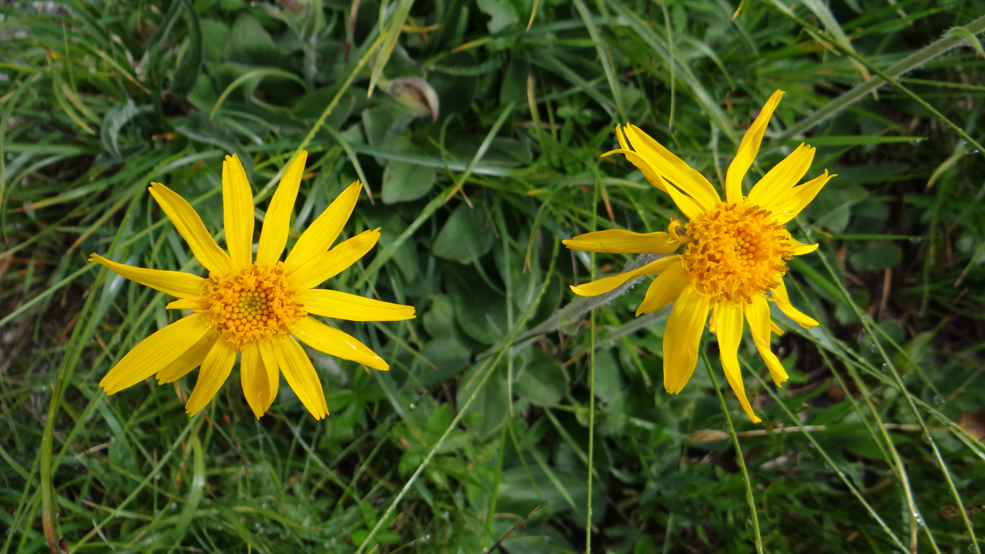 Arnica en Vanoise (Arnica Montana)